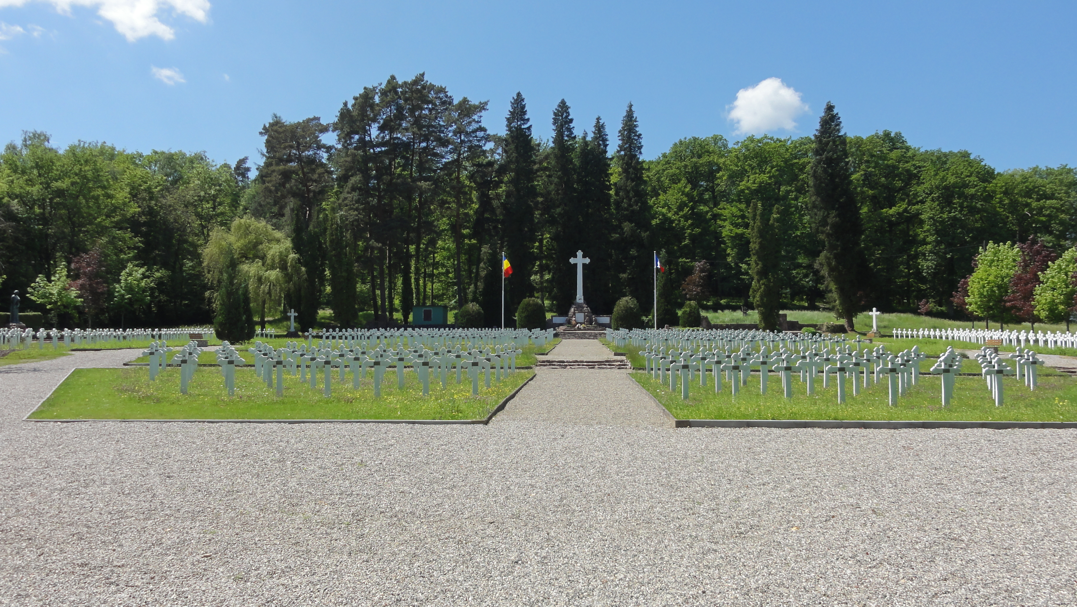 Alsace, Haut-Rhin, Soultzmatt, Cimetière militaire roumain de la Première Guerre Mondiale.